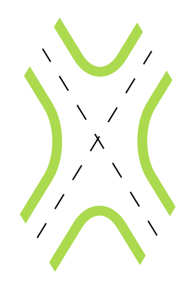 X形平面道路交叉口